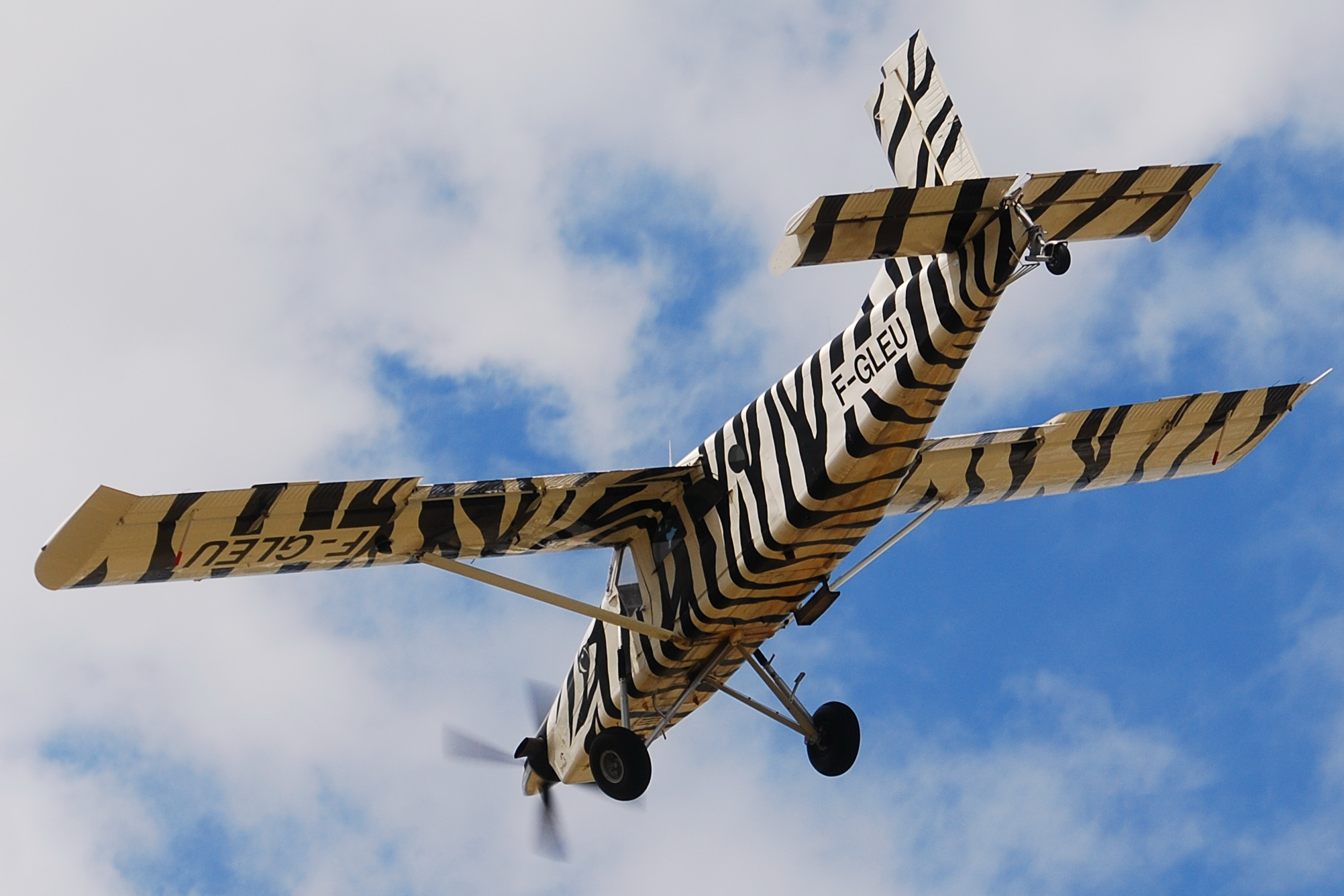 Photo prise à l'aéroport de Toulouse-Blagnac (LFBO) en France. Picture take at Toulouse-Blagnac Airport (LFBO) in France.